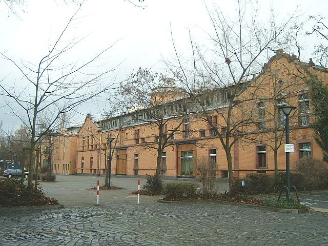 selbst erstellt am 26.12.05. Der Bertramshof ist ein ehemaliger großer Bauernhof, der nun Teile des Hessischen Rundfunks und des deutschen Fernsehens beherbergt. Er befindet sich im Frankfurter Stadtteil Dornbusch.